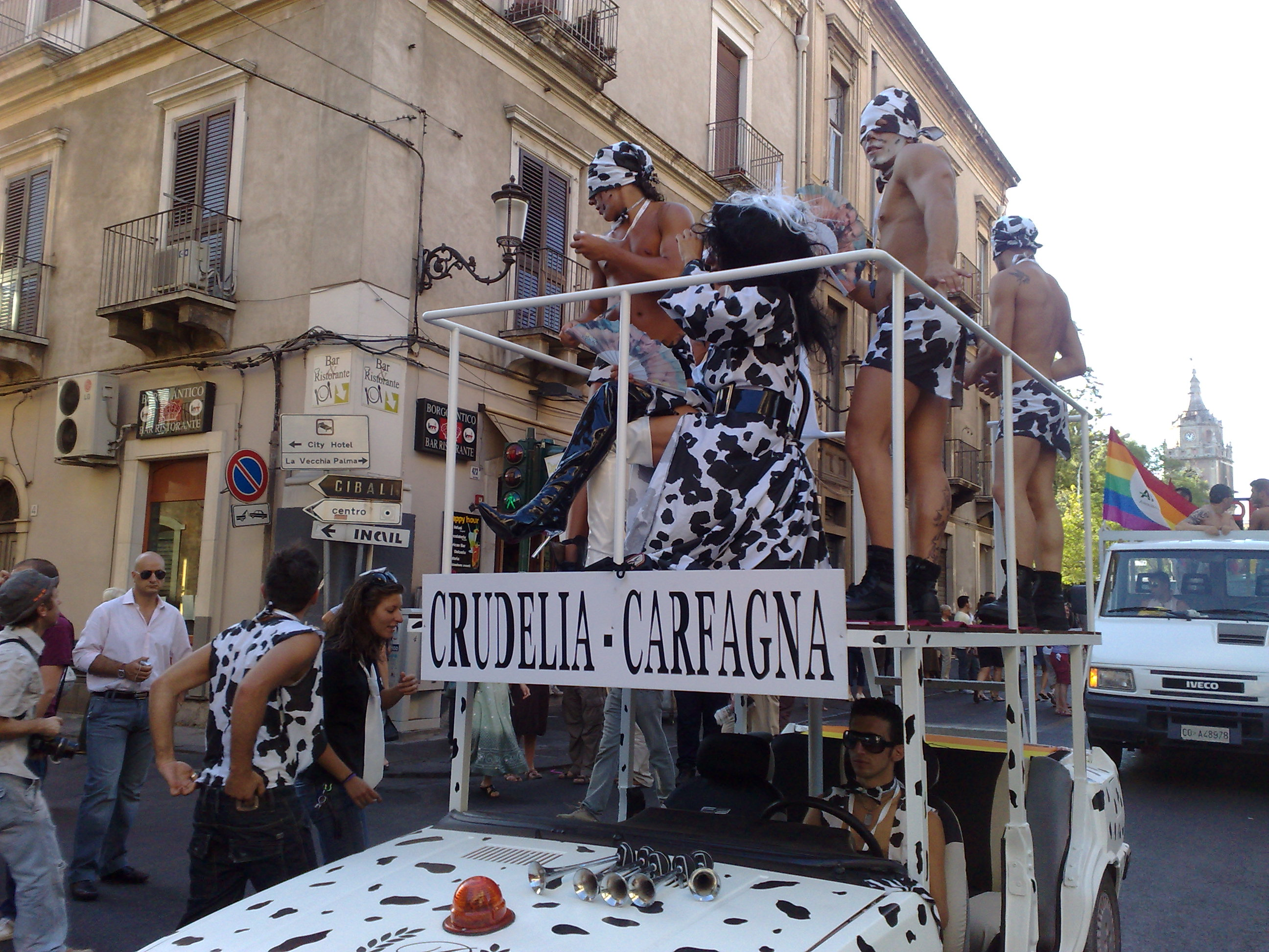 Pride a Catania 2008, Carro contro il ministro Carfagna